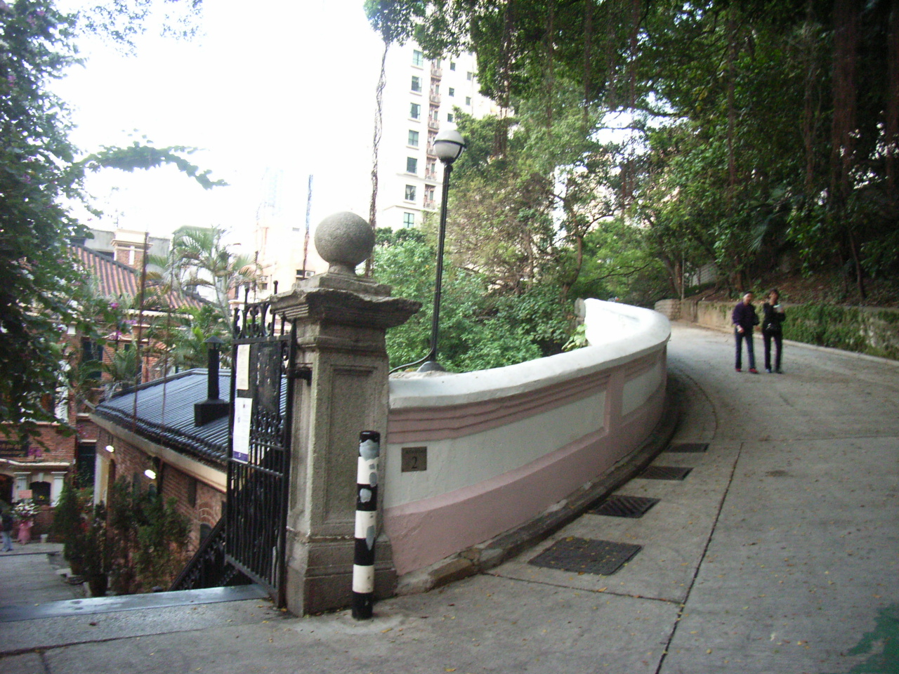 香港醫學博物館 (英文名字: Hong Kong Museum of Medical Sciences，簡稱 HKMMS)，是香港一所以醫學為主題的博物館。它位於香港島中西區上環。